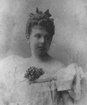 Извольская Маргарита, графиня Толь